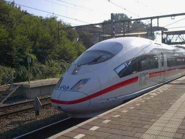 ICE3 op station Arnhem richting Amsterdam